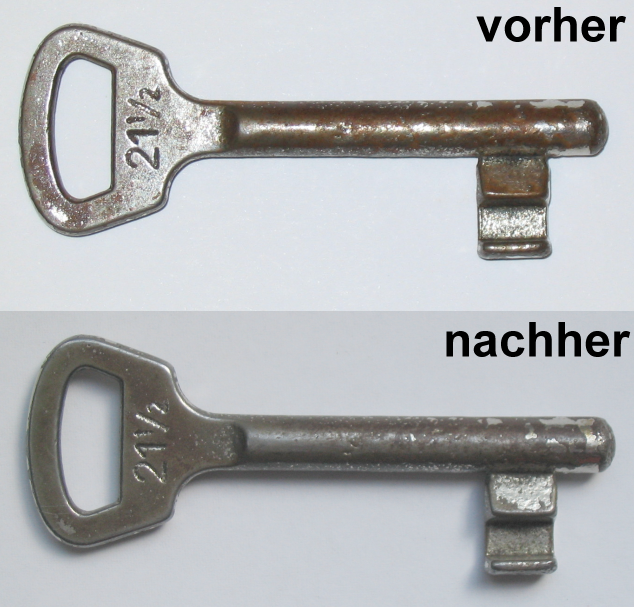 Demonstration der Wirkung eines Rostumwandlers (Cola). Schlüssel vor und nach der Behandlung mit Cola.